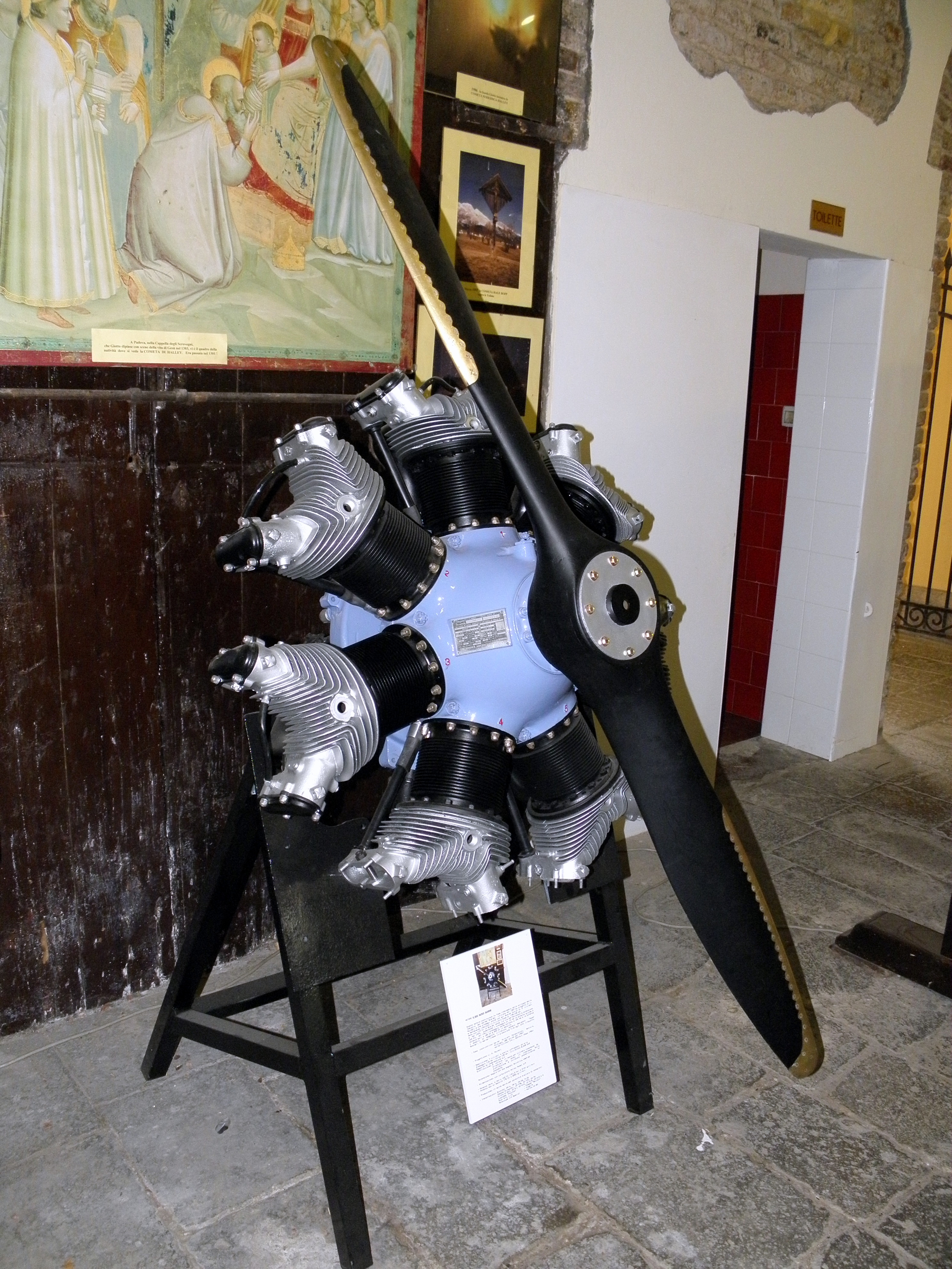 San Pelagio, frazione di Due carrare: Museo dell'aria e dello spazio, il motore aeronautico Warner R-500-7 Super Scarab model 165 in esposizione al museo.